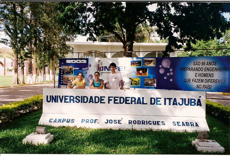 Entrada do campus da Universidade Federal de Itajubá